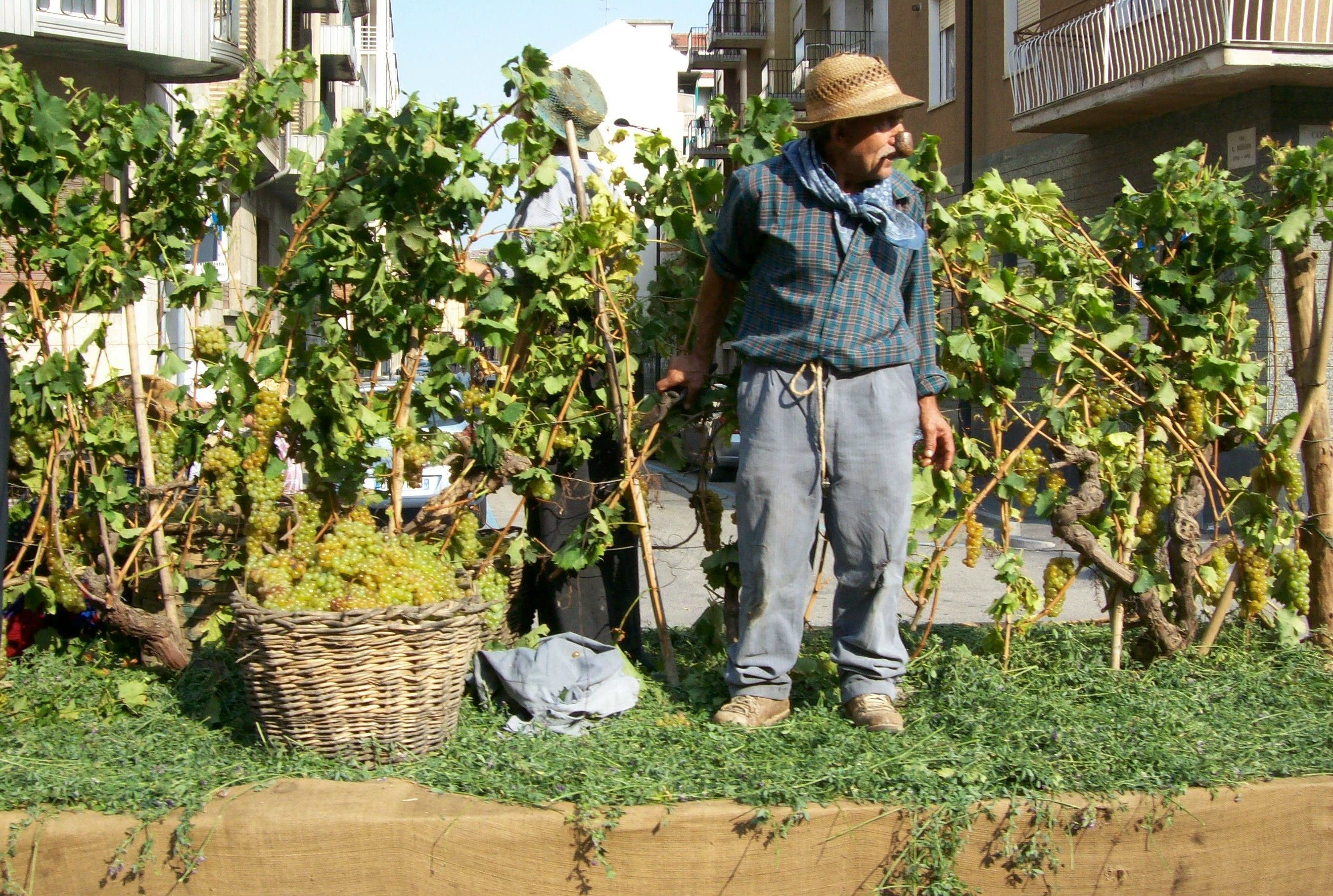 Figuranti della sfilata delle sagre di Asti